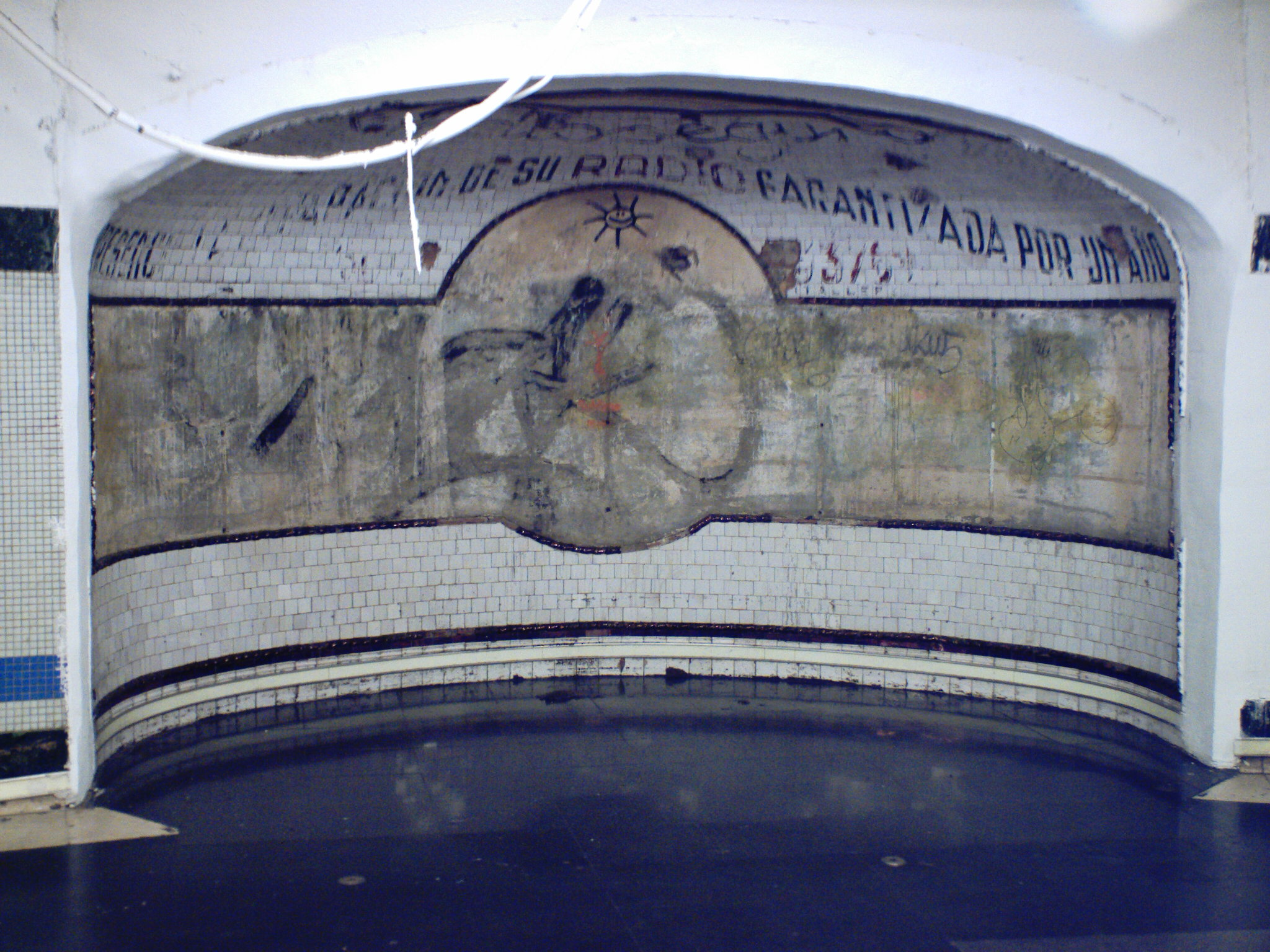 Hueco con su decoración original descubierto recientemente tras un tabique en los pasillos de la estación de Bilbao en el Metro de Madrid.